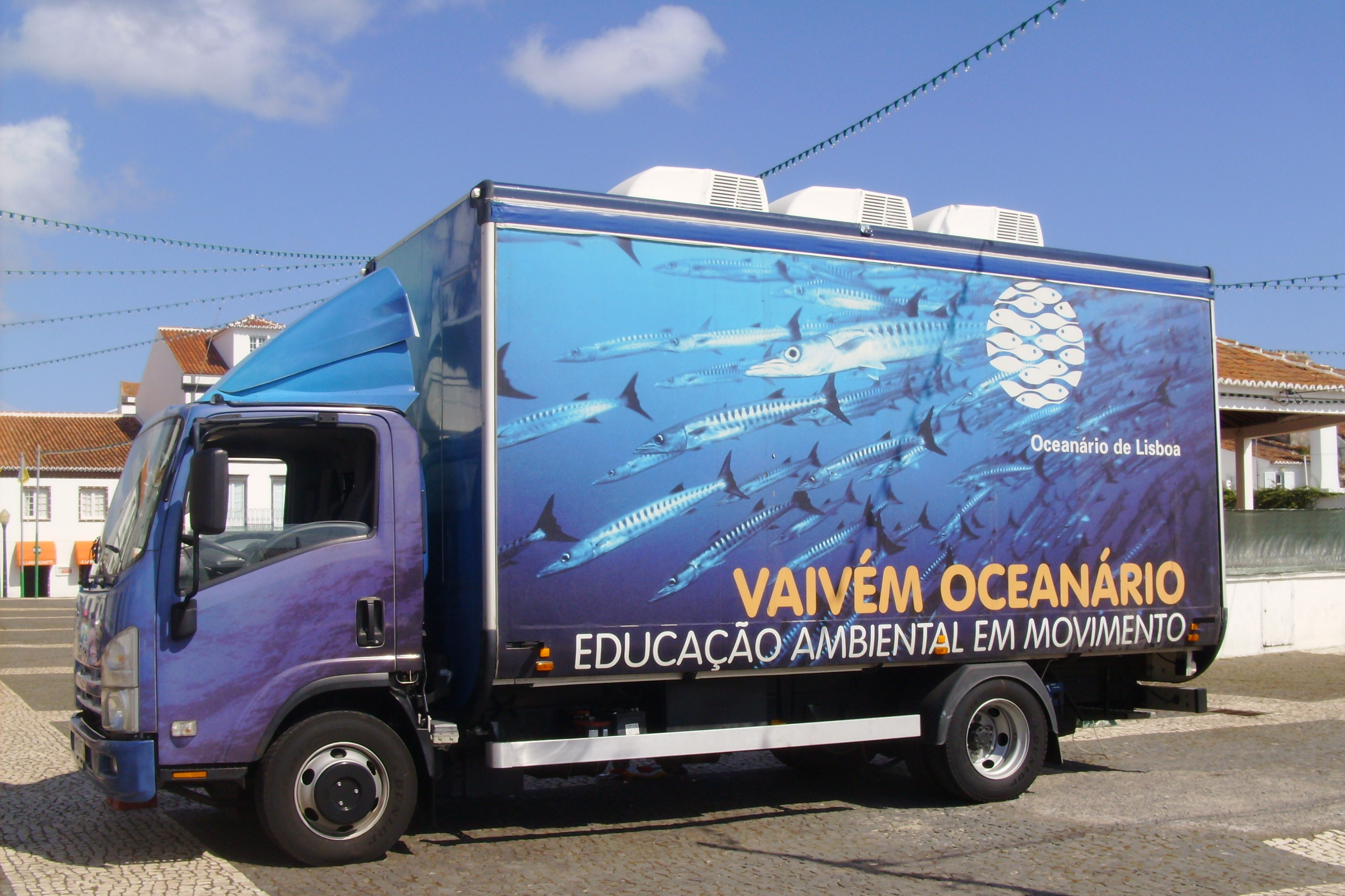 The Vaivém Oceanário, a mobile aquarium from the Oceanarium of Lisbon, at Vila do Porto (Azores), Portugal